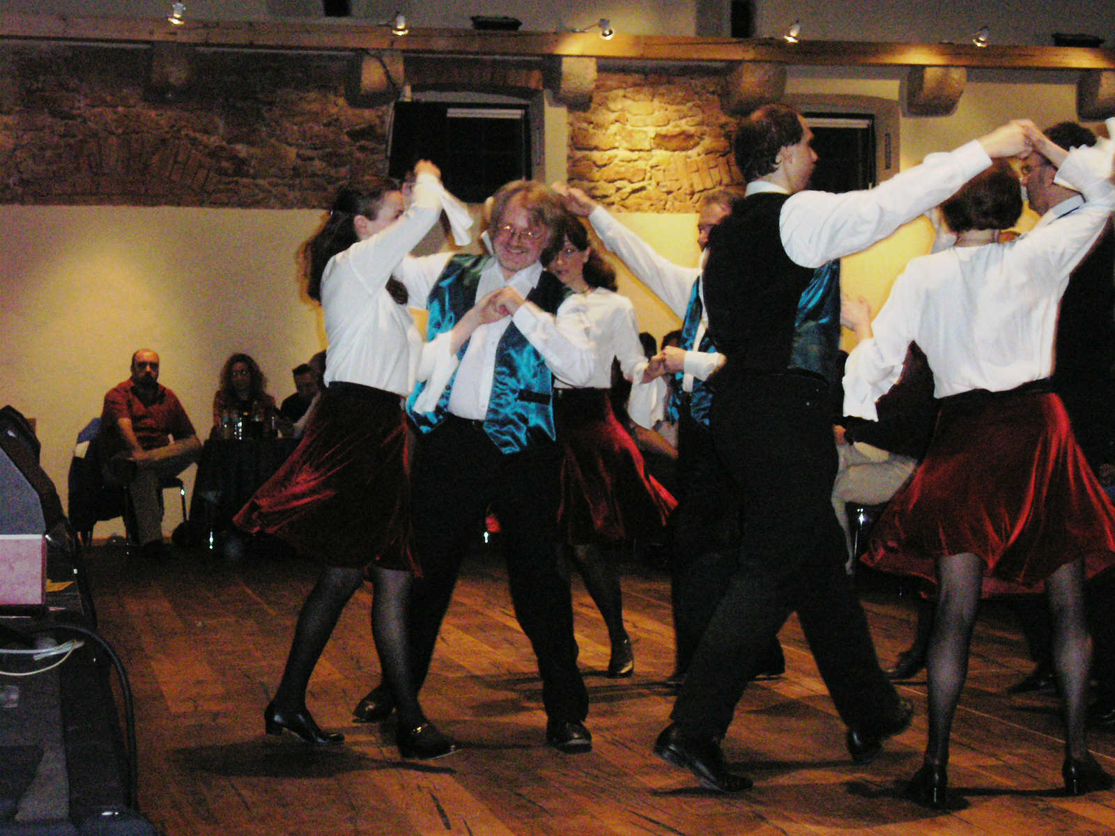 CladdaghSetDance